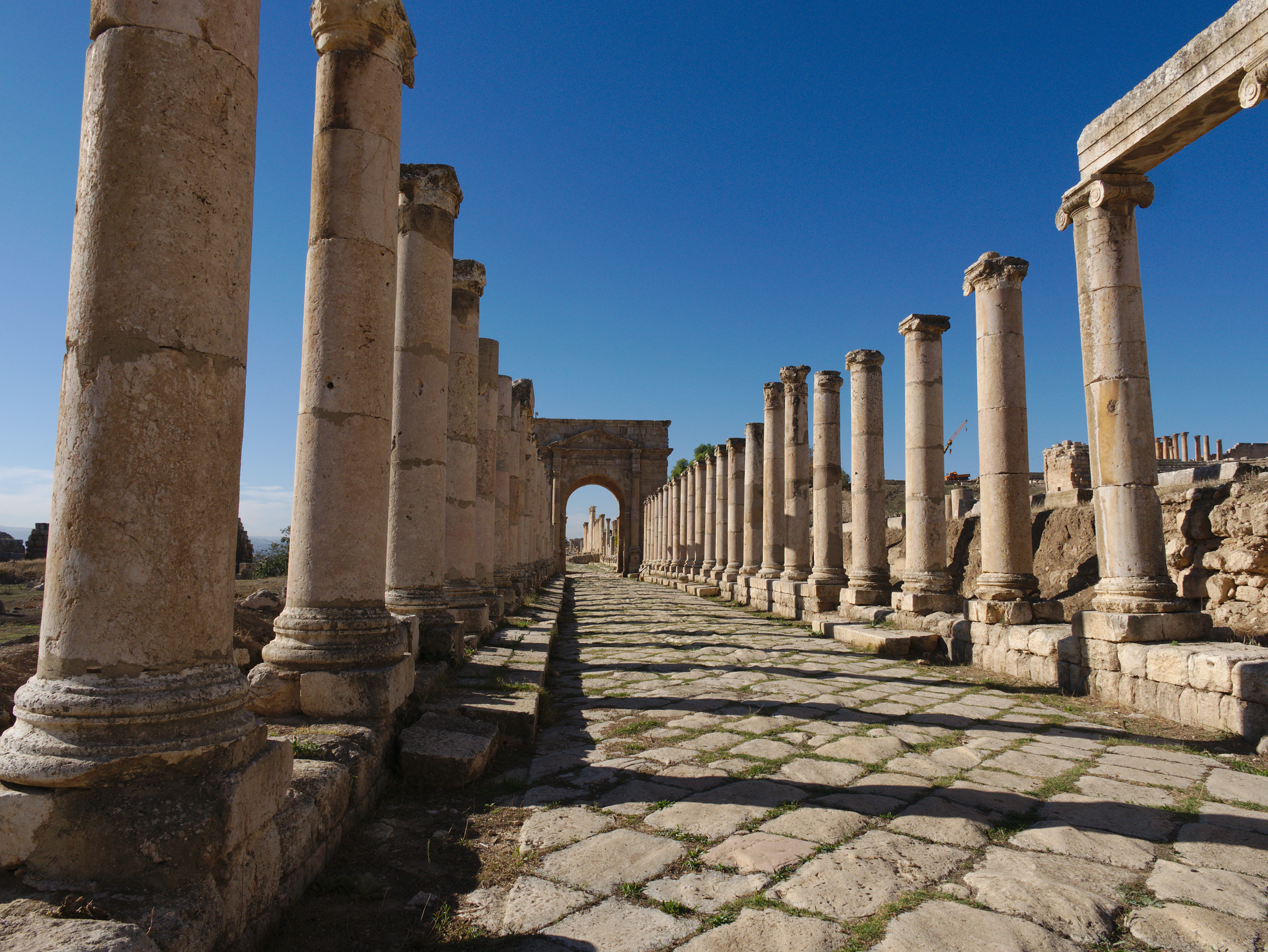 Colonnes du Cardo à proximité de la porte nord